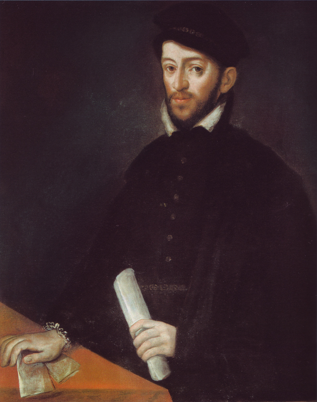 Retrato del político y funcionario español Antonio Pérez del Hierro (1540-1611), que llegó a ser secretario del rey Felipe II de España y se hizo célebre por su implicación en el asesinato de Juan de Escobedo.